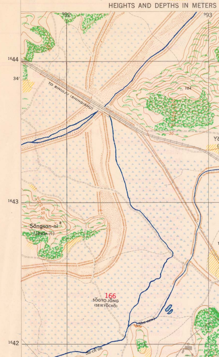 성산,홍제천,성산동,서교동 일대 옛날지도(1946년)